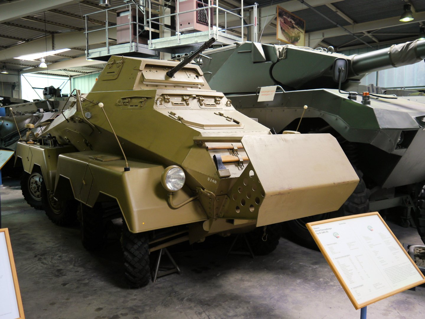 Wehrtechnische Studiensammlung Koblenz 29